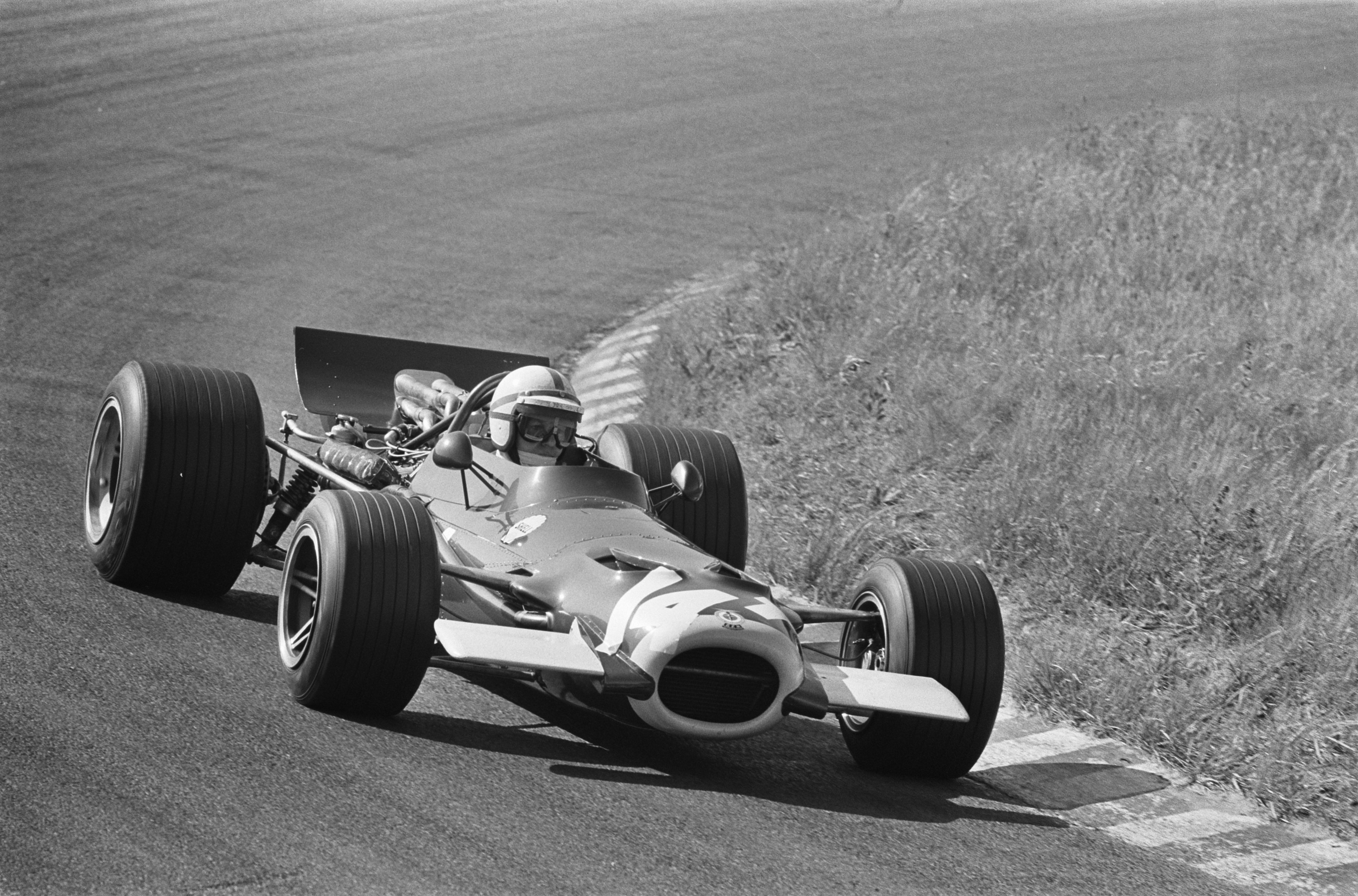 Nr. 14 in actie.